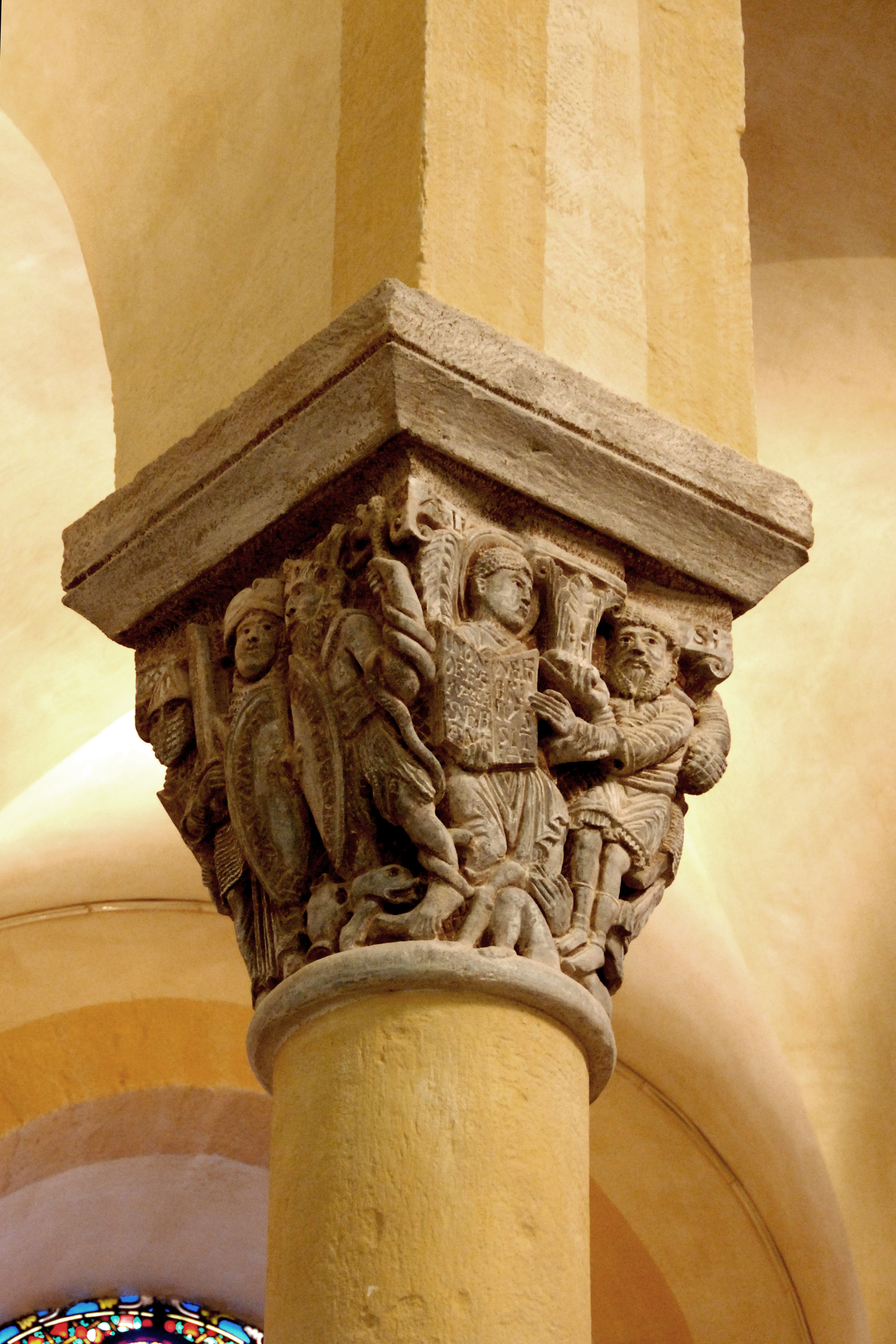 Notre-Dame du Port, Chorkapitell A Seiten 1 + 2